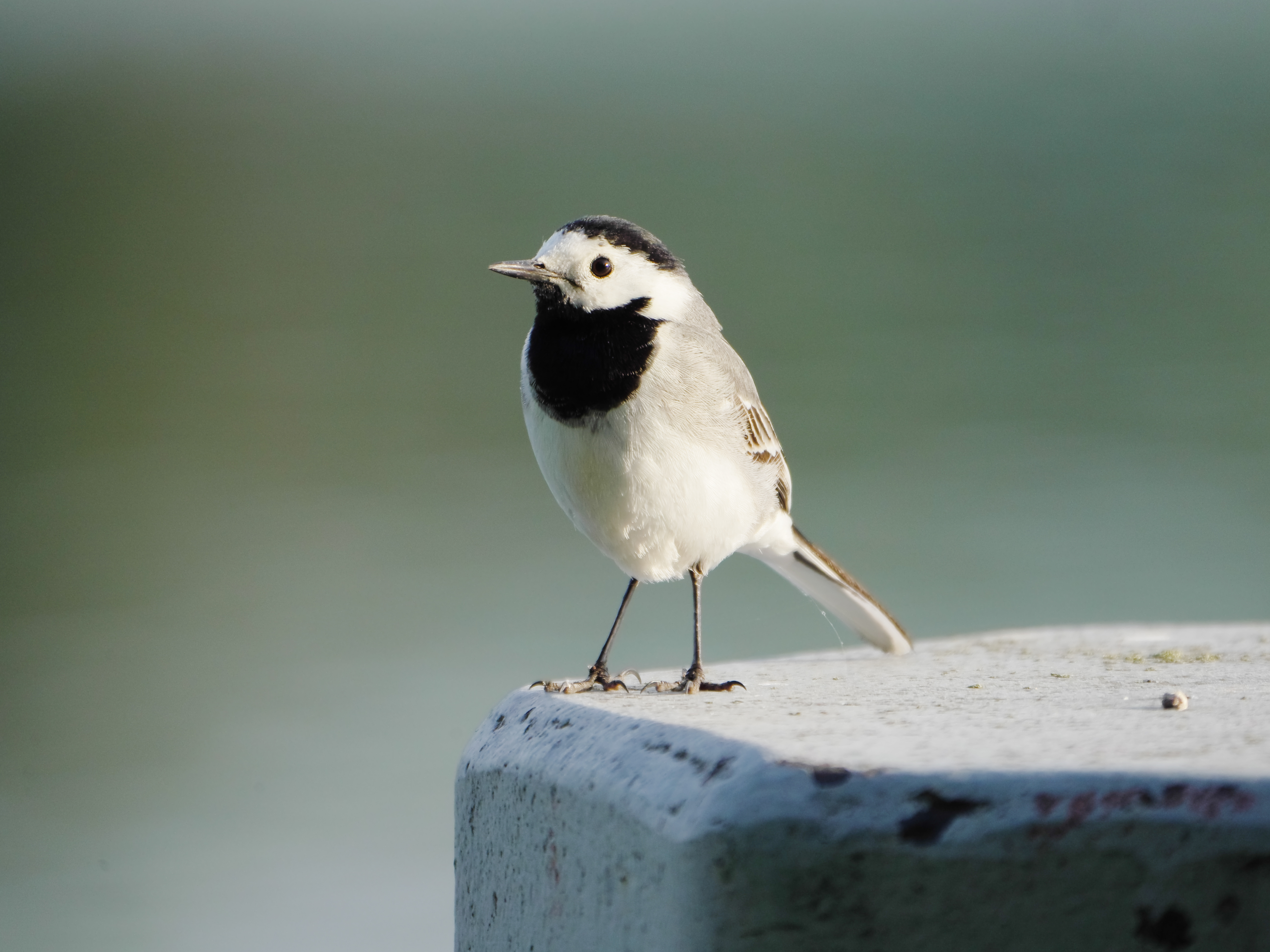 Bachstelze (Motacilla alba) am Krughorn im Europäischen Vogelschutzgebiet DE-3544-306 „Westlicher Düppeler Forst“ in Berlin